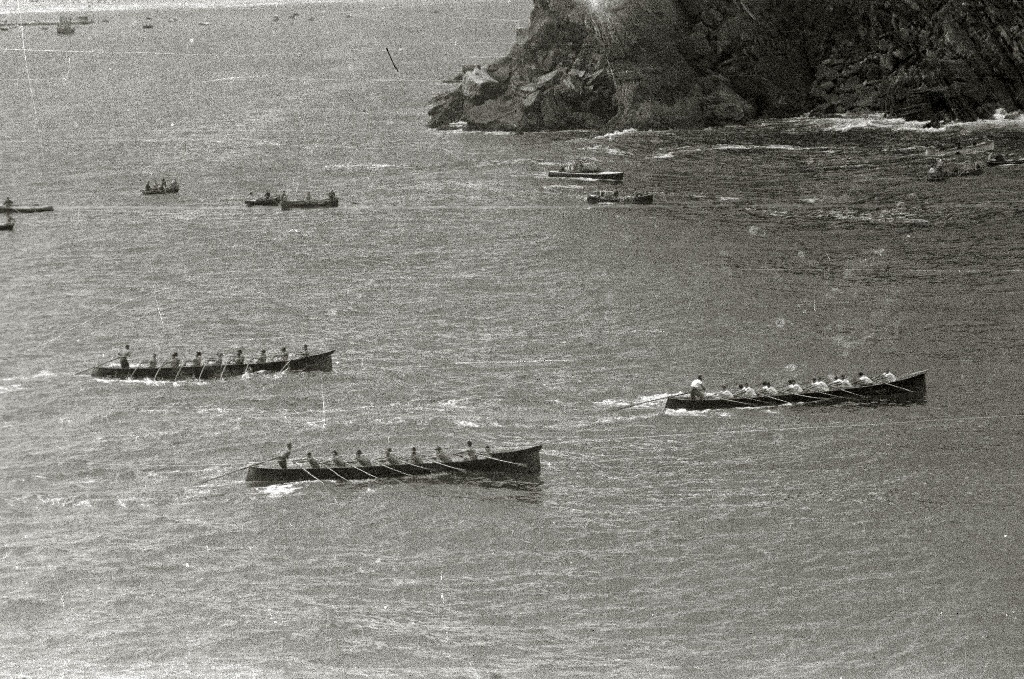 Título original: Regatas de traineras en la bahía de la Concha (42/127) Localización: San Sebastián (Guipúzcoa)